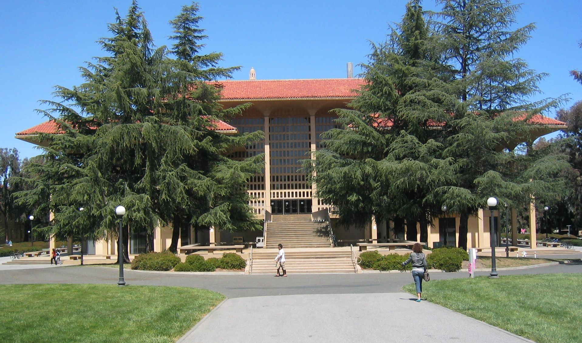 Stanford meyer library